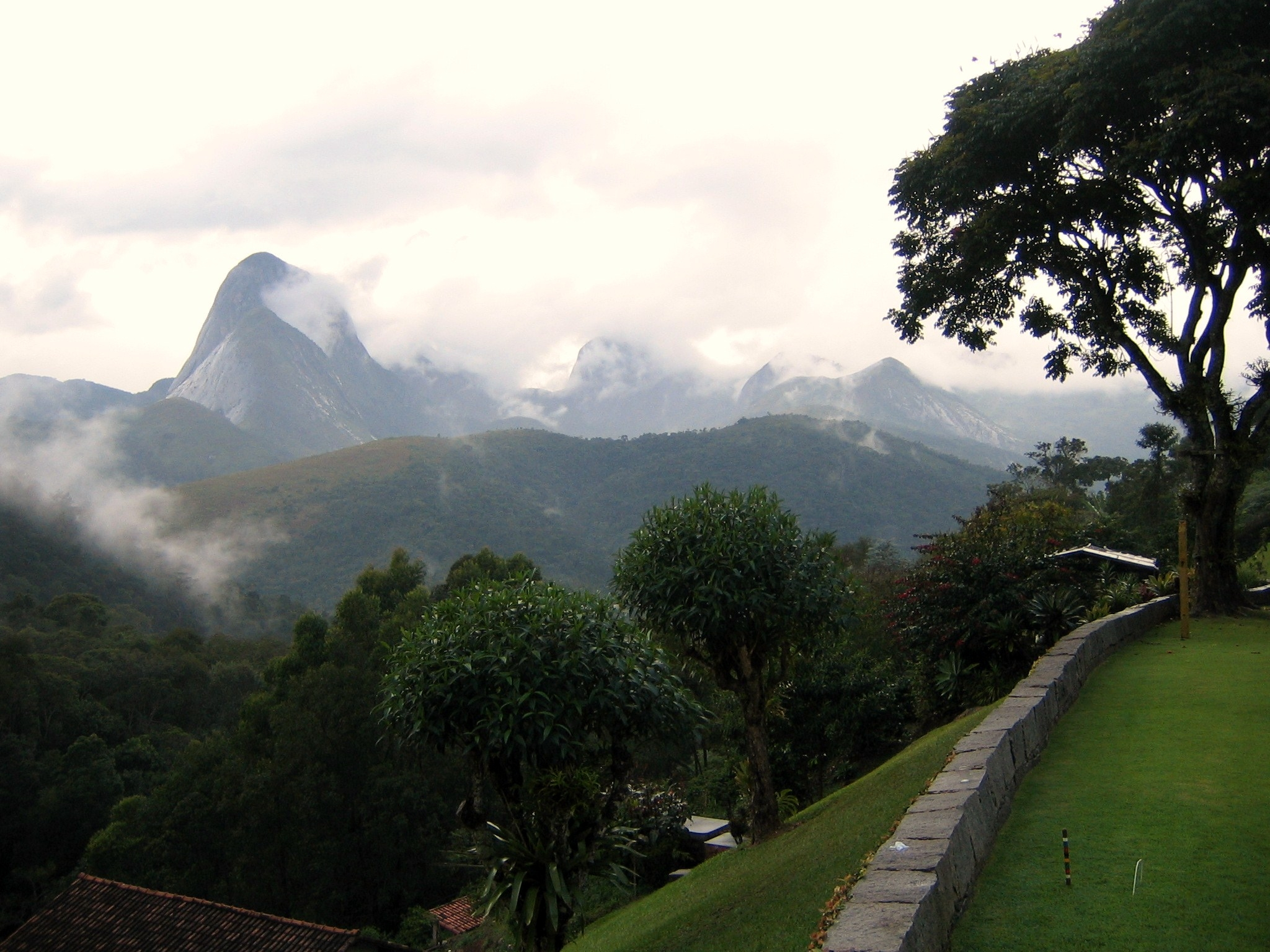 la vallée des rivières Quitandinha et Piabanha Petrópolis, Etat deÉtat de Rio de Janeiro Brésil.